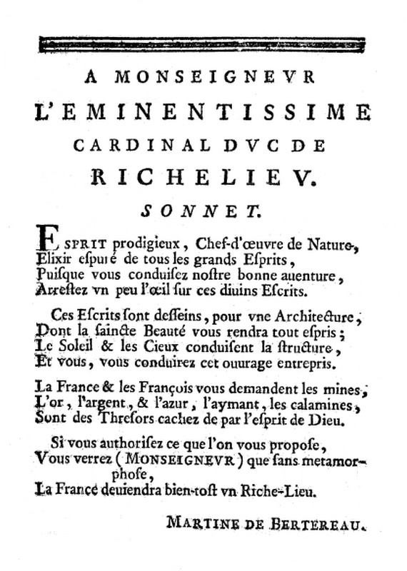 Sonnet dédié au Cardinal de Richelieu composé par Martine de Bertereau dans son ouvrage La Restitution de Pluton.